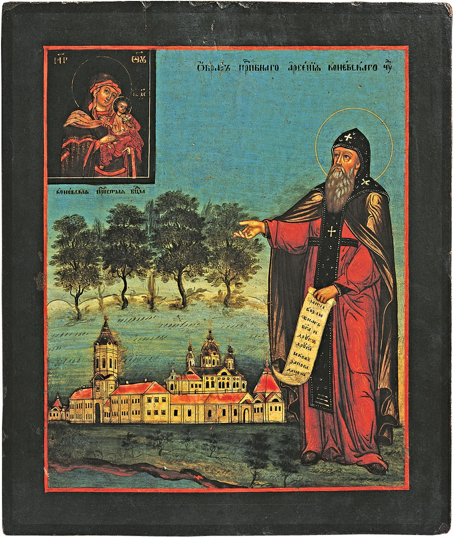 Преподобный Арсений Коневский